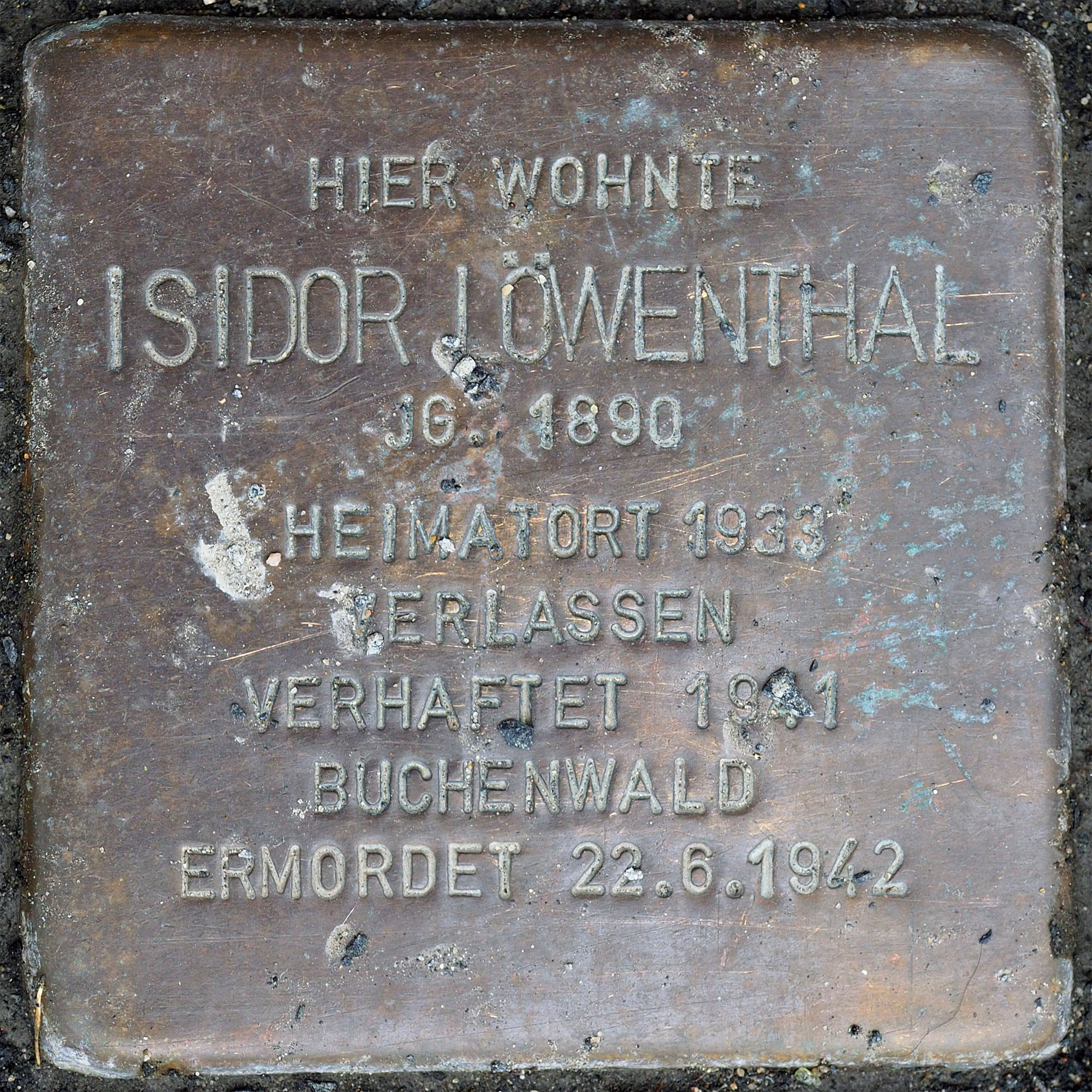 Stolpersteine GV: Löwenthal Isidor